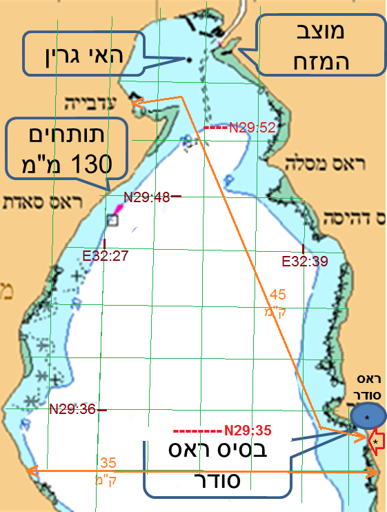 מפת אזור פעילות יחידה 838 בצפון מפרץ סואץ 1975-1968